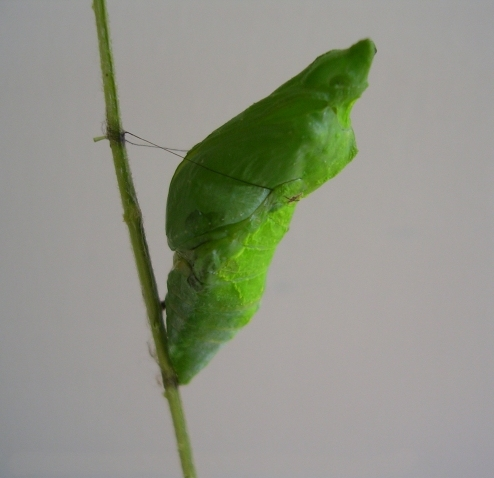 Papilio polytes pupa